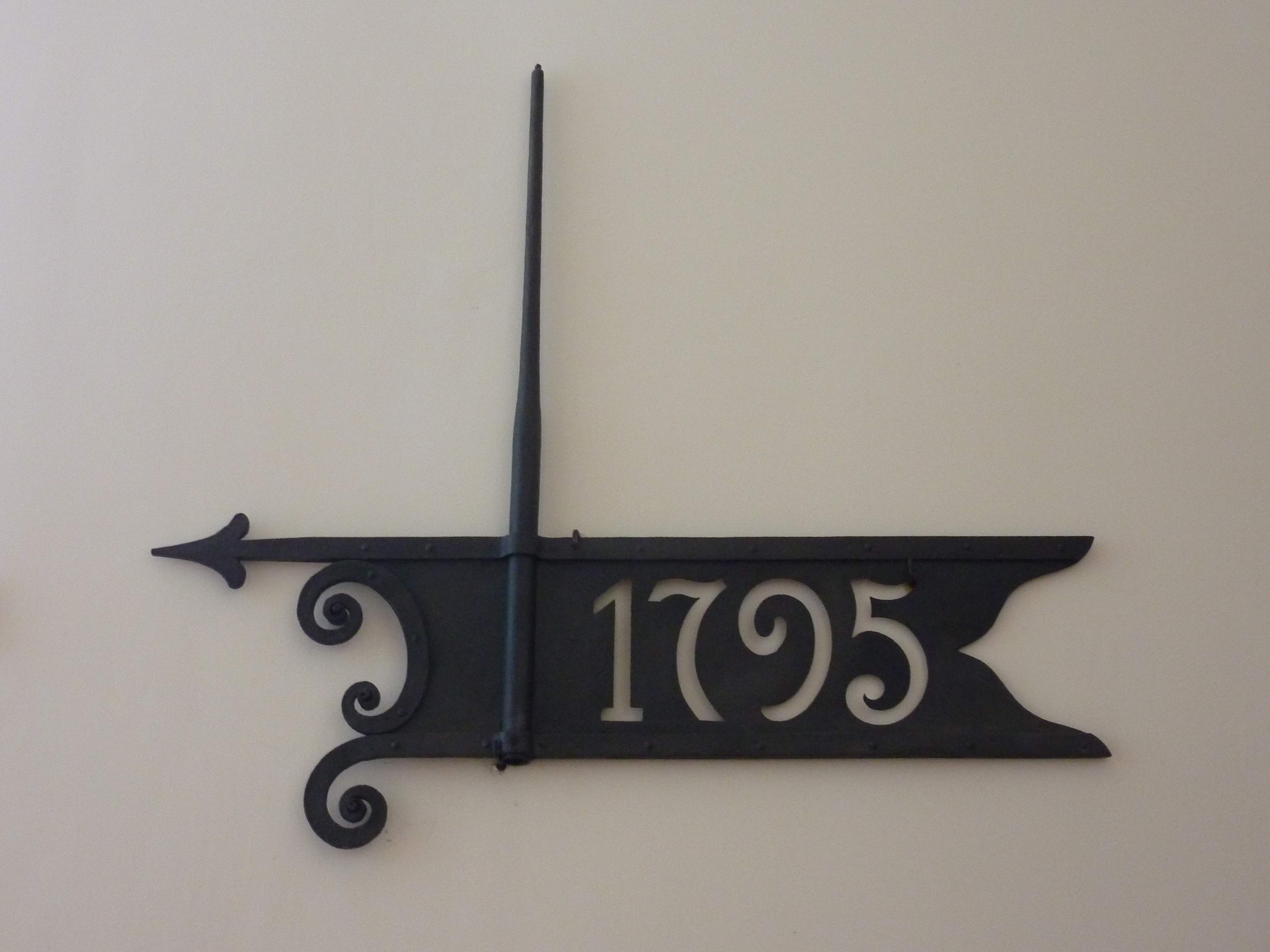 Kirchenfahne der ehemaligen Dorfkirche von Berlin-Falkenberg aus dem Jahr 1795, ausgestellt in der Kirche Berlin-Wartenberg in Berlin-Neu-Hohenschönhausen.